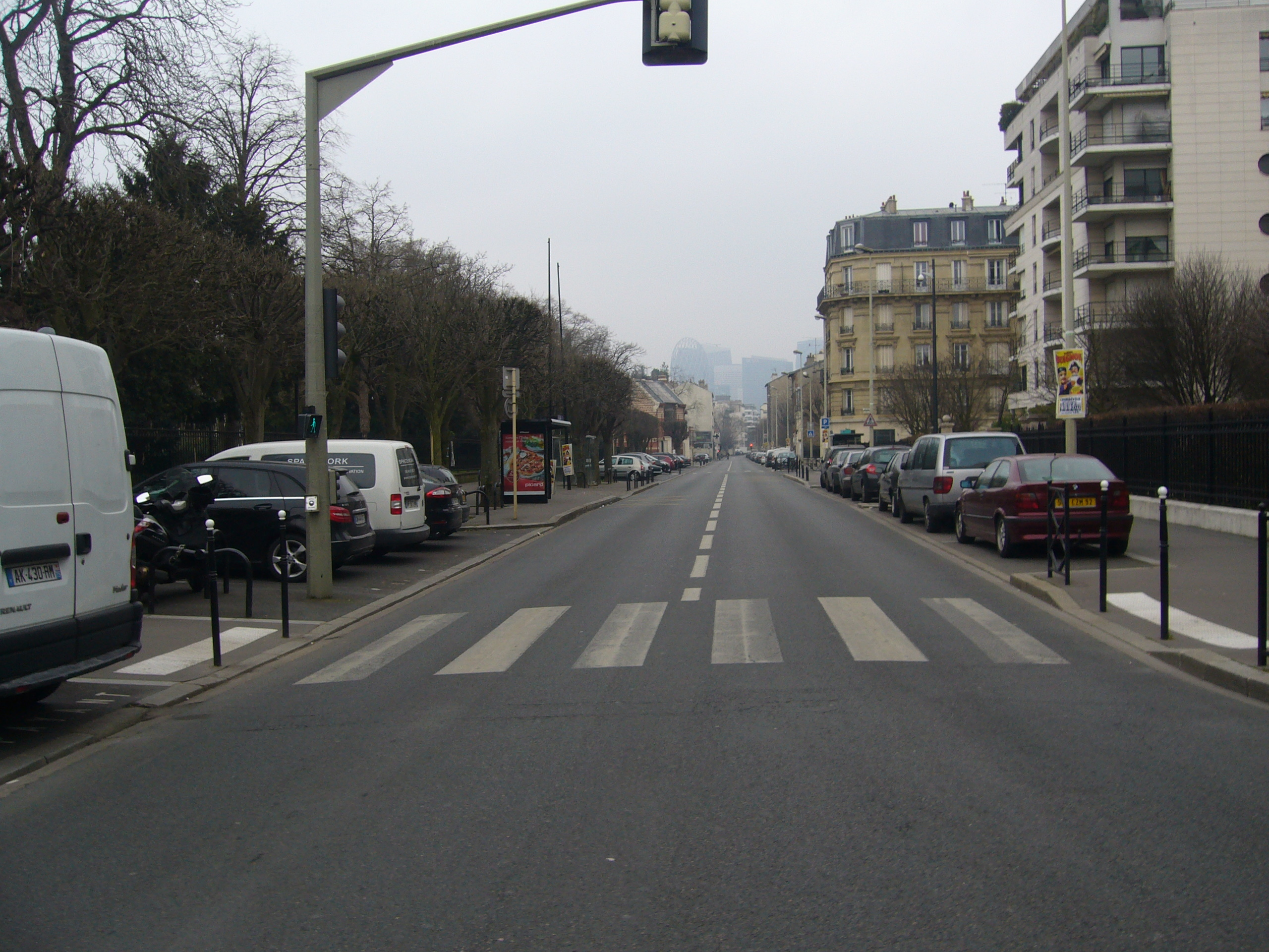 Vues du Boulevard Saint Denis Courbevoie